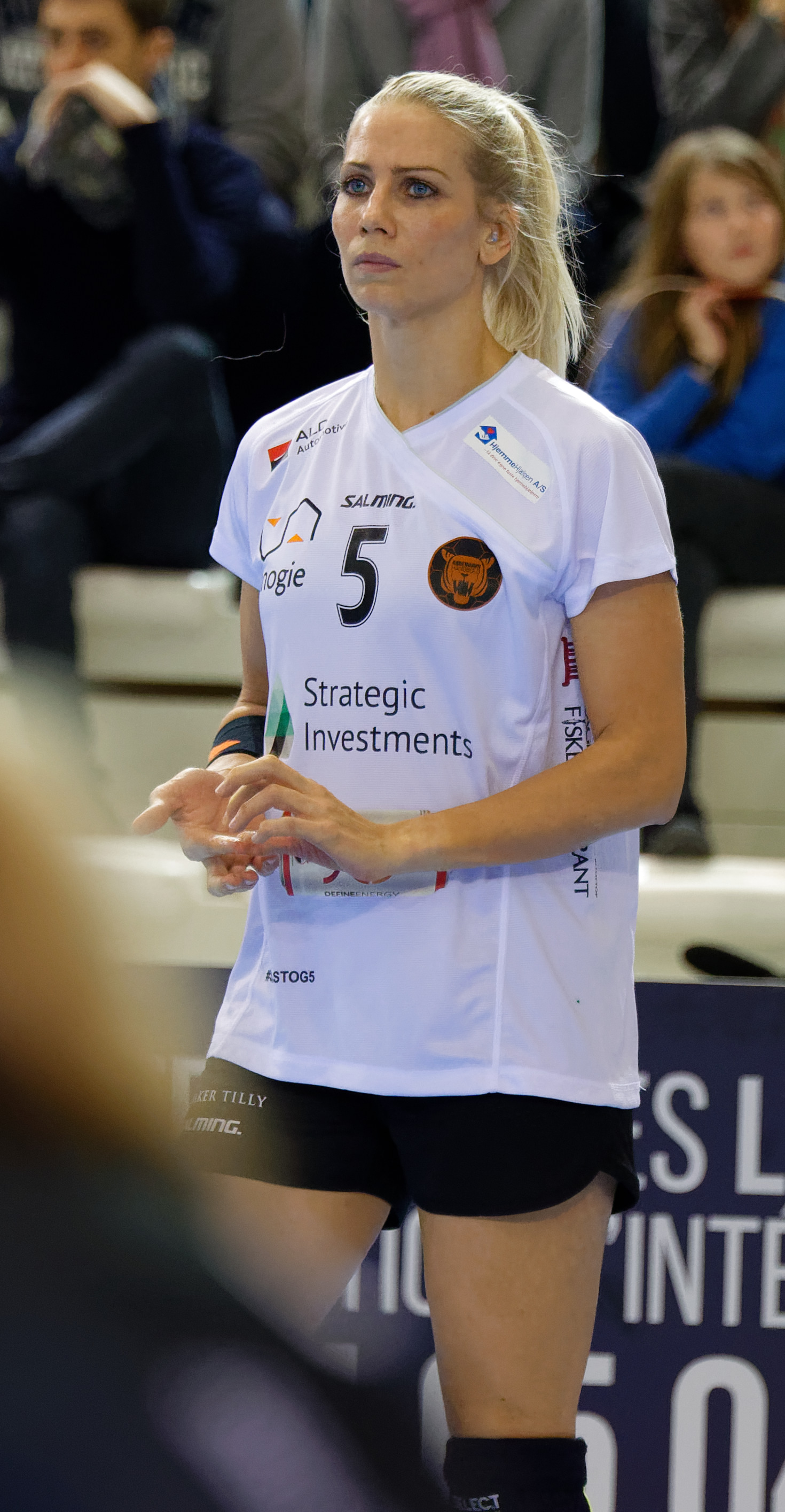 Rencontre du tour principal de la coupe EHF entre Issy Paris Hand et les danoises de Copenhague. A Issy Les Moulineaux, le 28 janvier 2018.